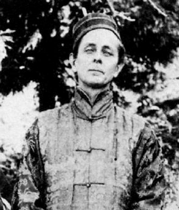 Recadrage de File:Walter_Evans-Wentz_and_Lama_Kazi_Dawa_Samdup_photographed_circa_1919.jpg